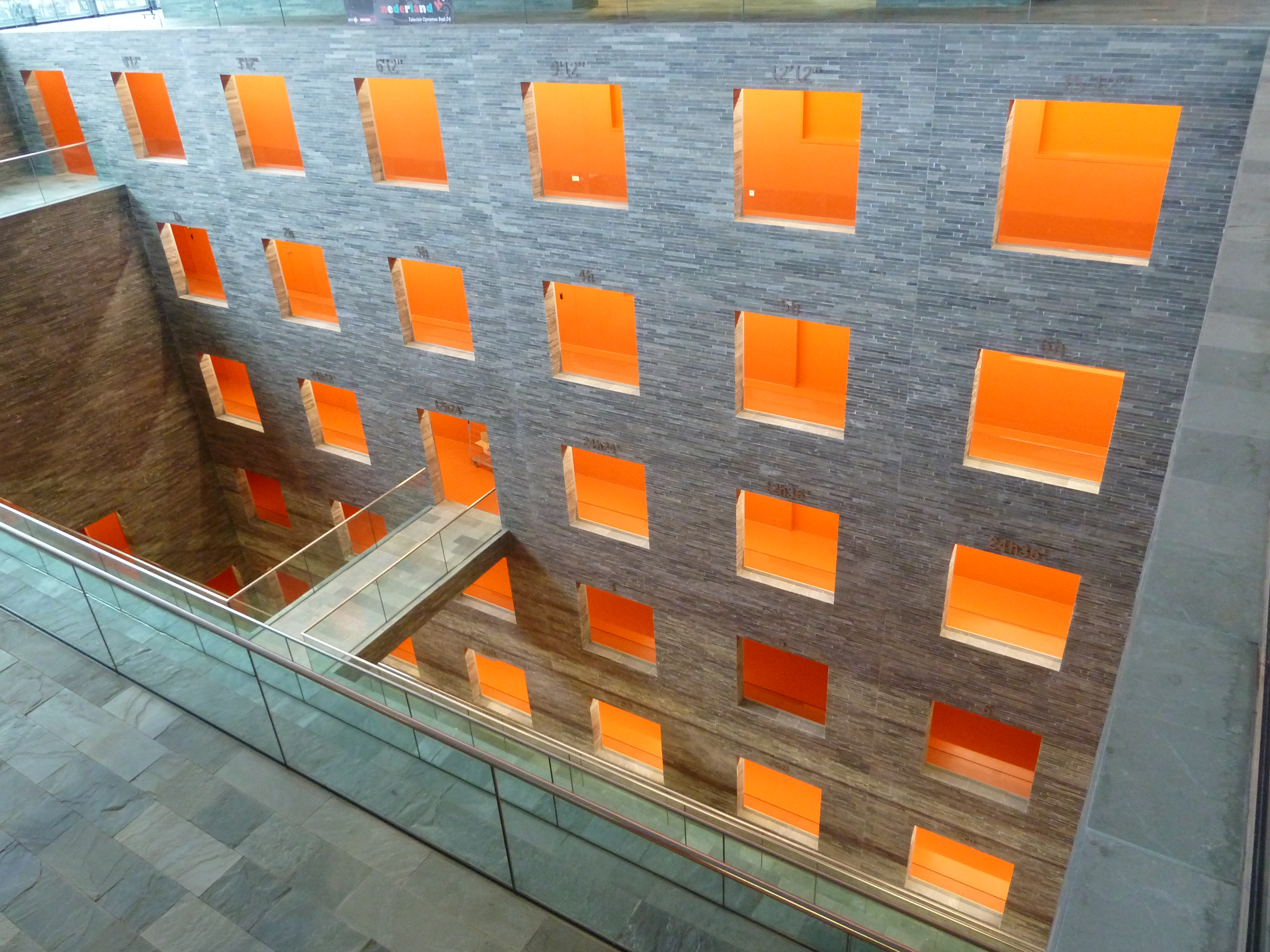 Nederlands Instituut voor Beeld en Geluid